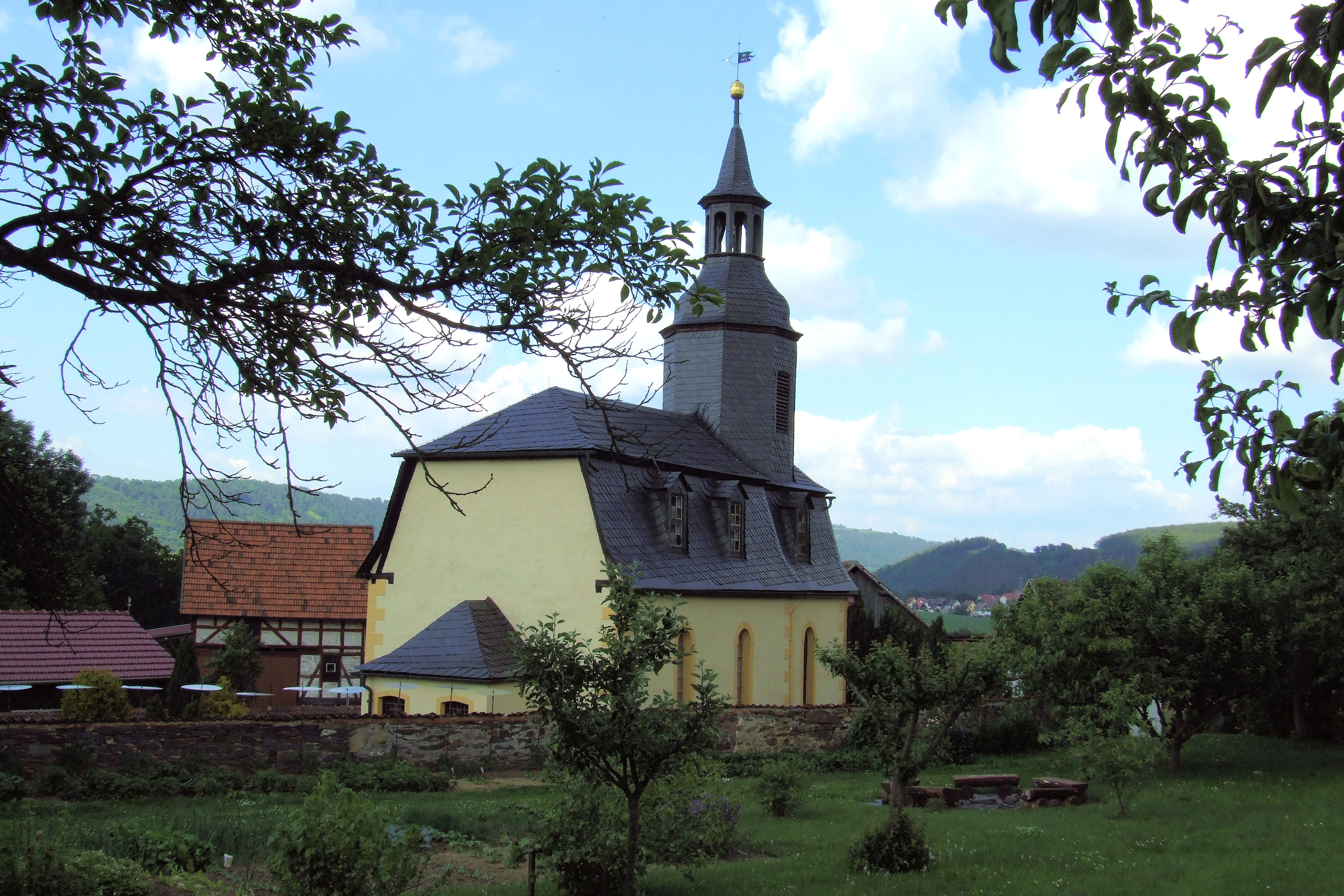 Kirche in Weischwitz